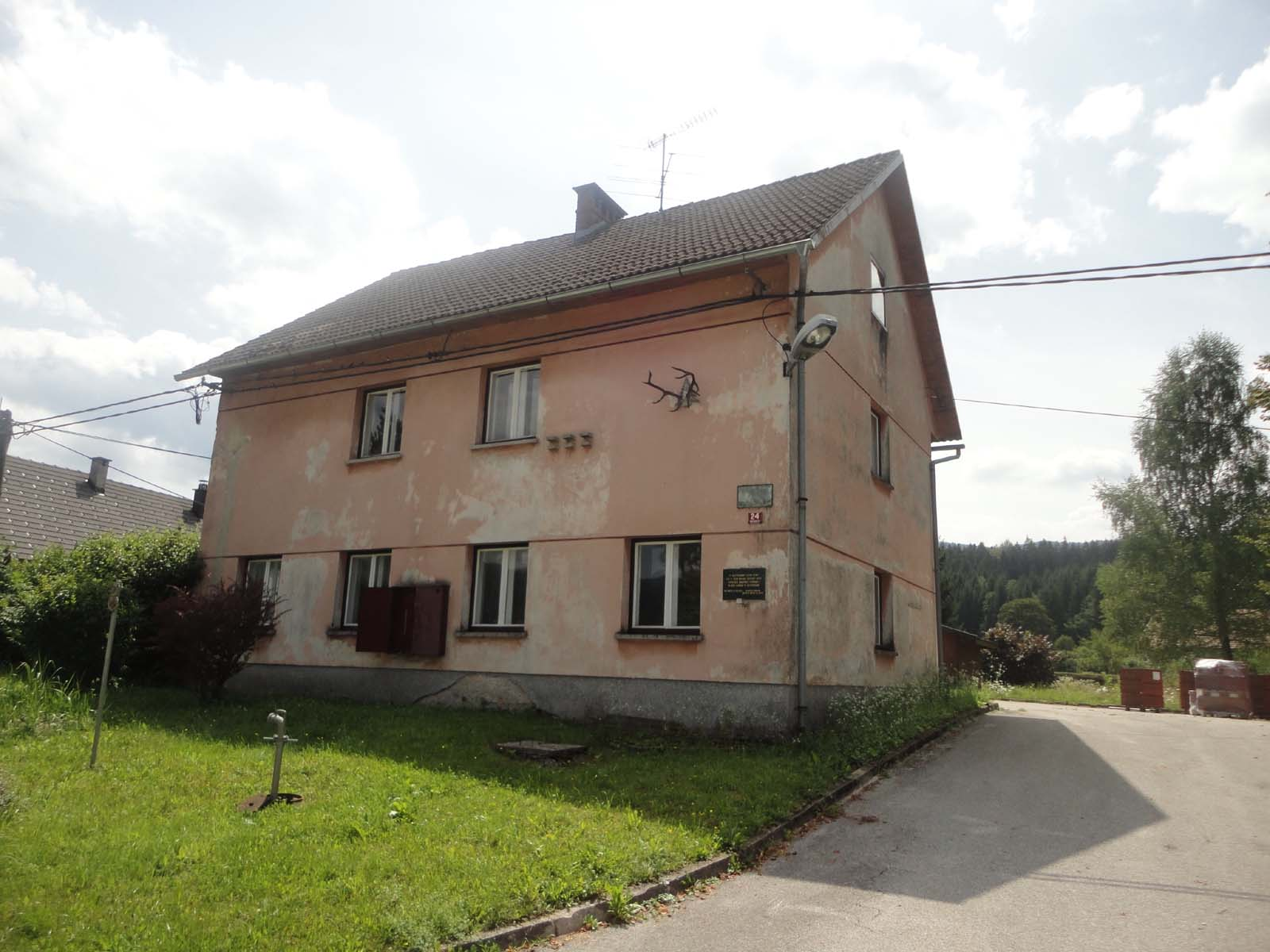 Grčarice na Kočevskem: hiša Rudolfa Tschinkla, kjer so partizani v septembru leta 1943 uničili postojanko Jugoslovanske vojske v domovini